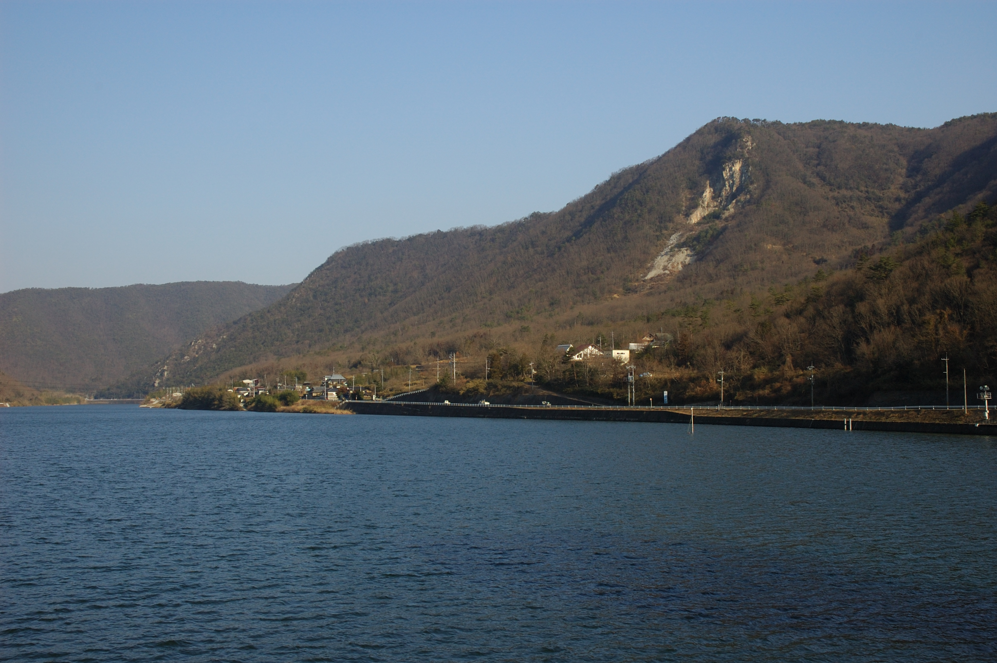 Tenjinyama hill and Yoshi river